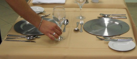 Eindecken eines Gasttisches für zwei Personen; hier Platzieren des sogenannten Richtglases.